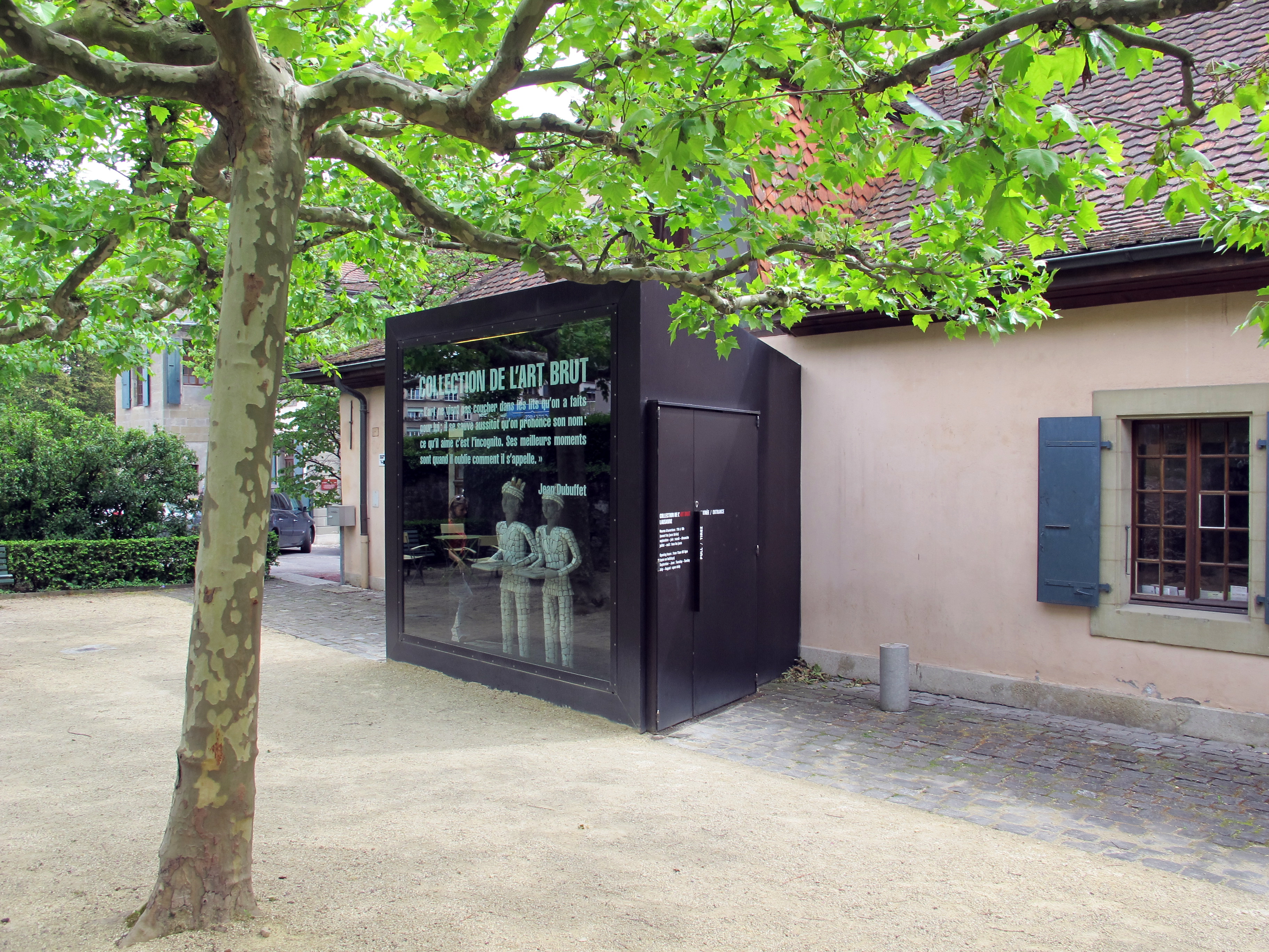 Losanna, Svizzera